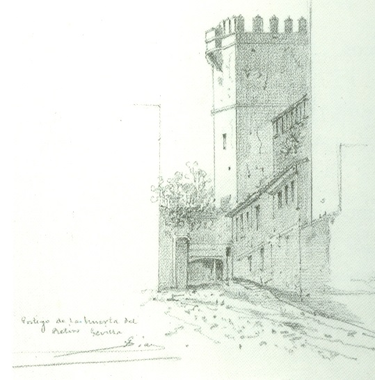 La ciudad de Sevilla perdió esta entrada de su muralla, cuando los terrenos exteriores fueron incorporados como tierra de labor de la huerta del Alcázar de Sevilla, y cercadas con muralla.